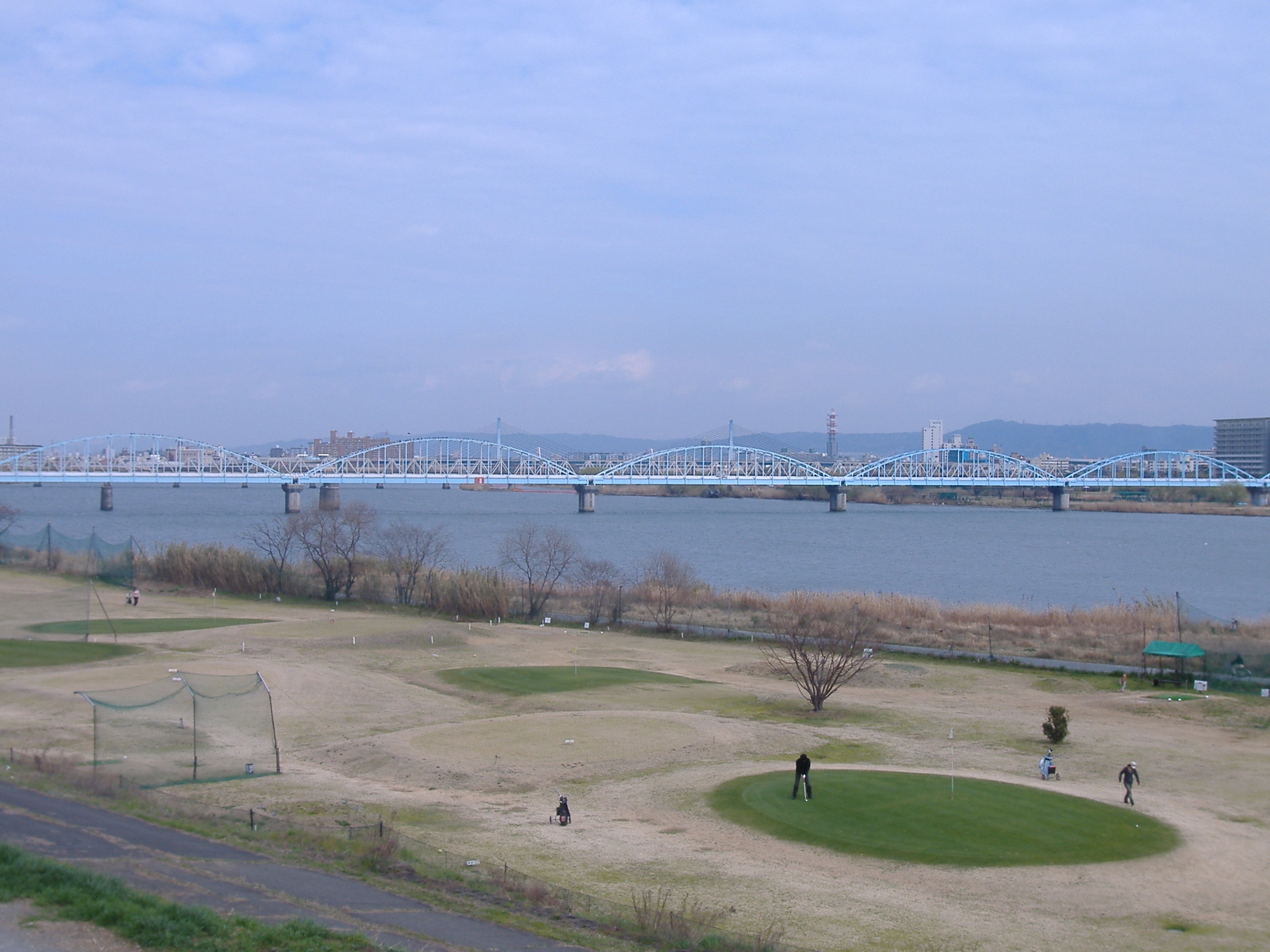 Río Yodo (es), Yodo River (en), 淀川 (ja)